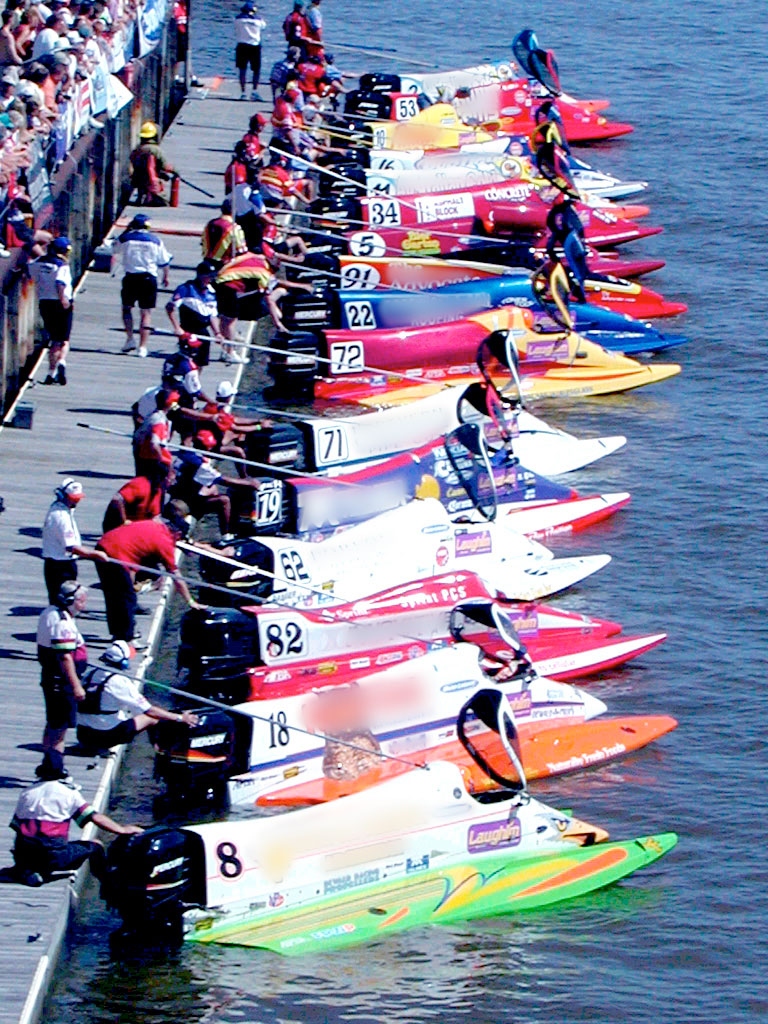 Carlos Kuri al arrancar la Carrera, Lake Havasu, Arizona USA, 2000